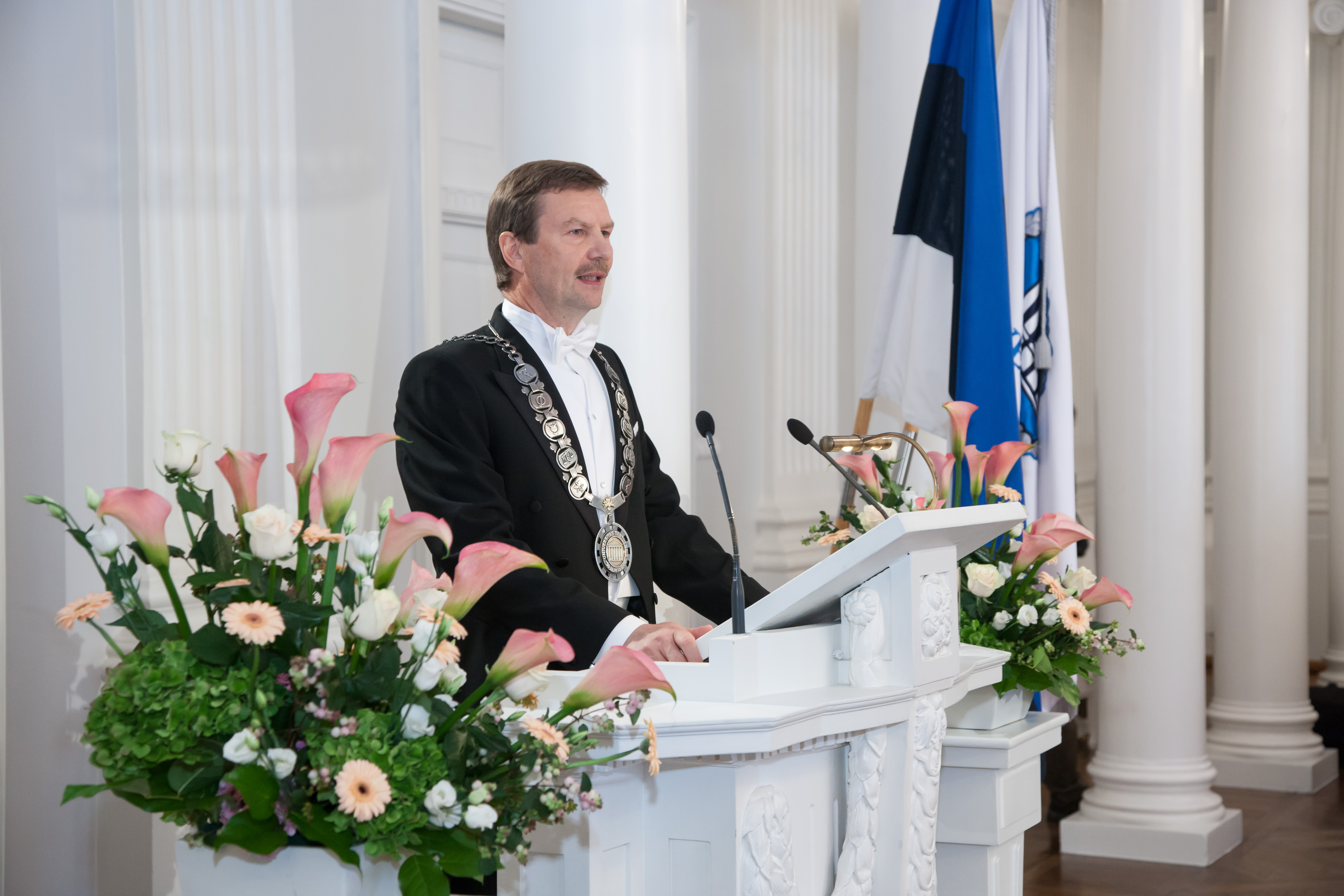 Tartu Ülikooli rektori professor Volli Kalmu inauguratsioon TÜ aulas 31. augustil 2012. Inauguratsioonikõne.